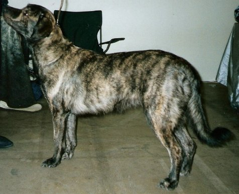 Cão Fila de São Miguel, Azores Cattle Dog (FCI 1)